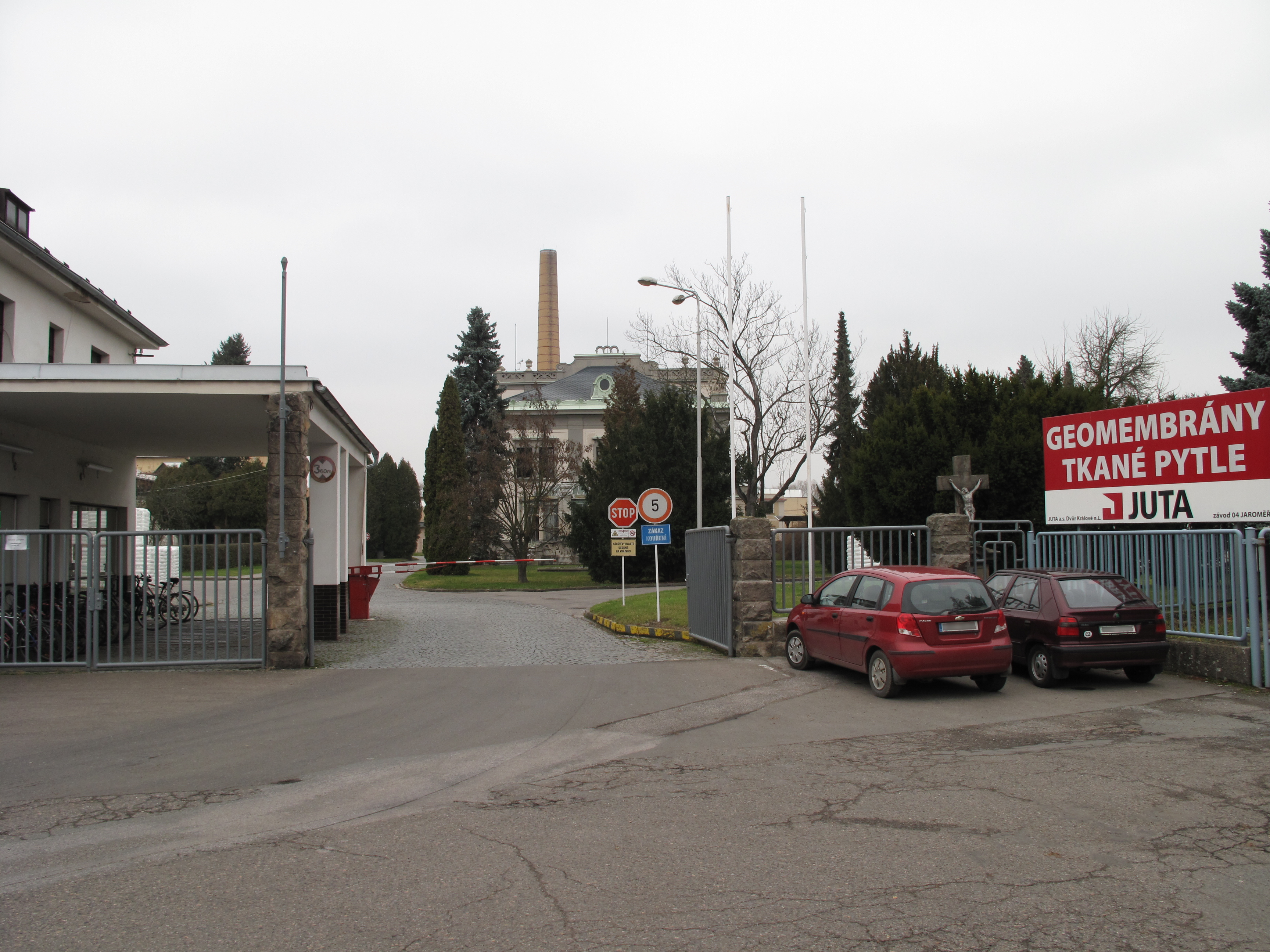 Závod 04 společosti JUTA a.s. v Jaroměři. Okres Náchod, Česká republika.